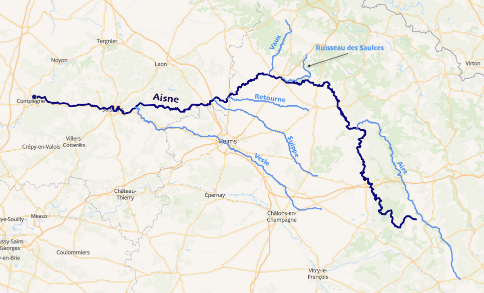 carte réalisée sur umap This map may be incomplete, and may contain errors. Don't rely solely on it for navigation.